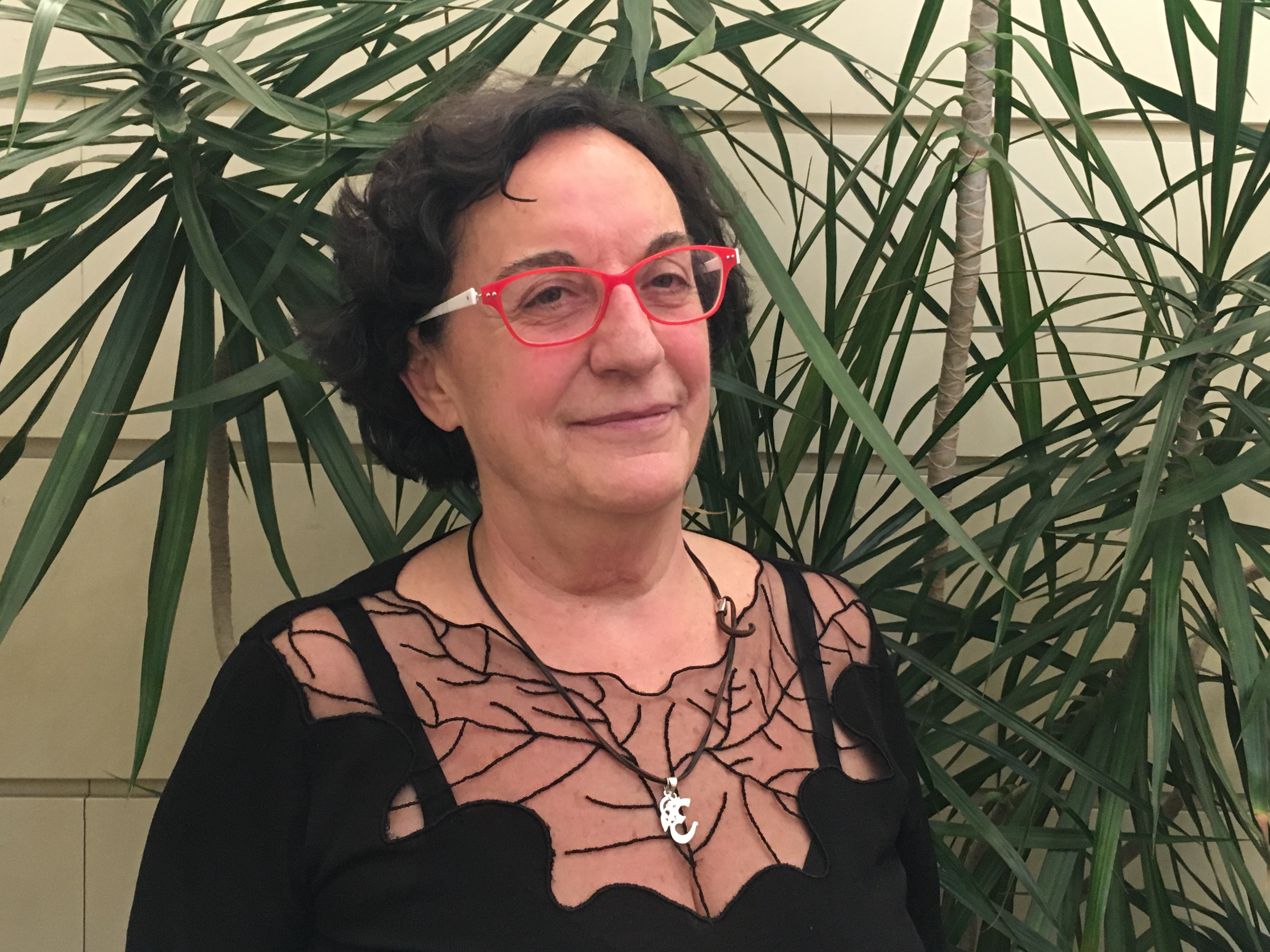 En el Senado mayo 3014